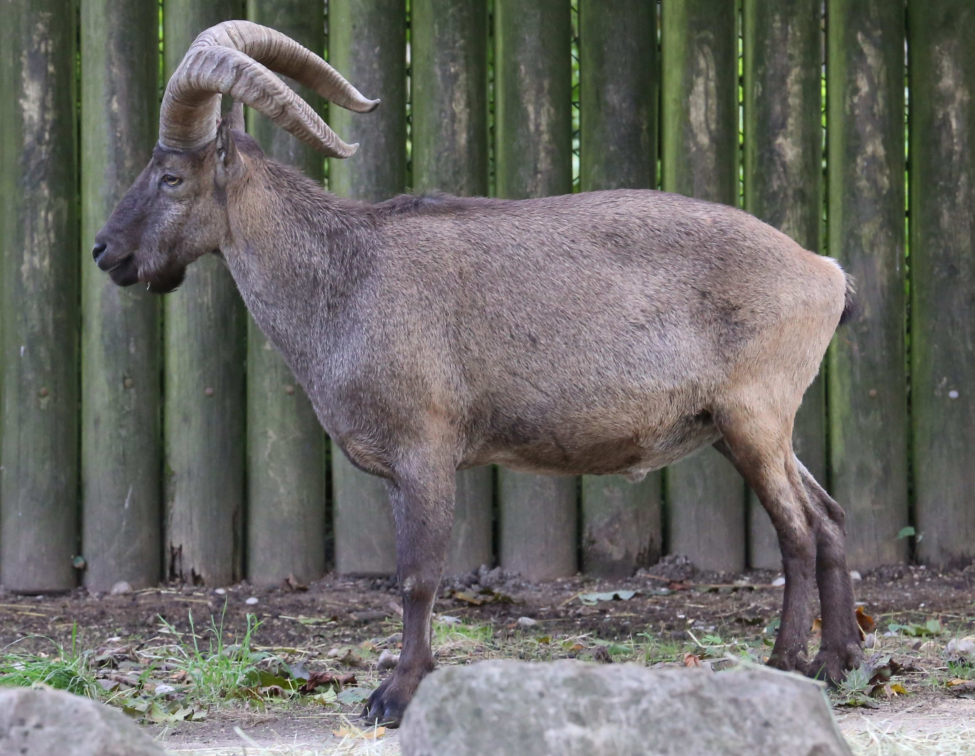 Daghestanischer Tur (Ostkaukasischer Steinbock), Capra cylindricornis, Zoo Augsburg